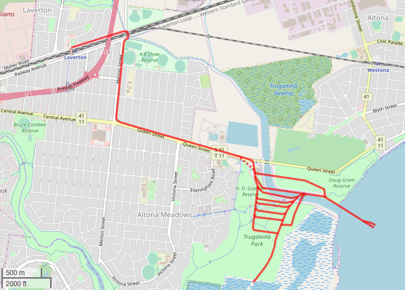 Information of a hand-drawn map superimposed onto an OpenStreetMap map